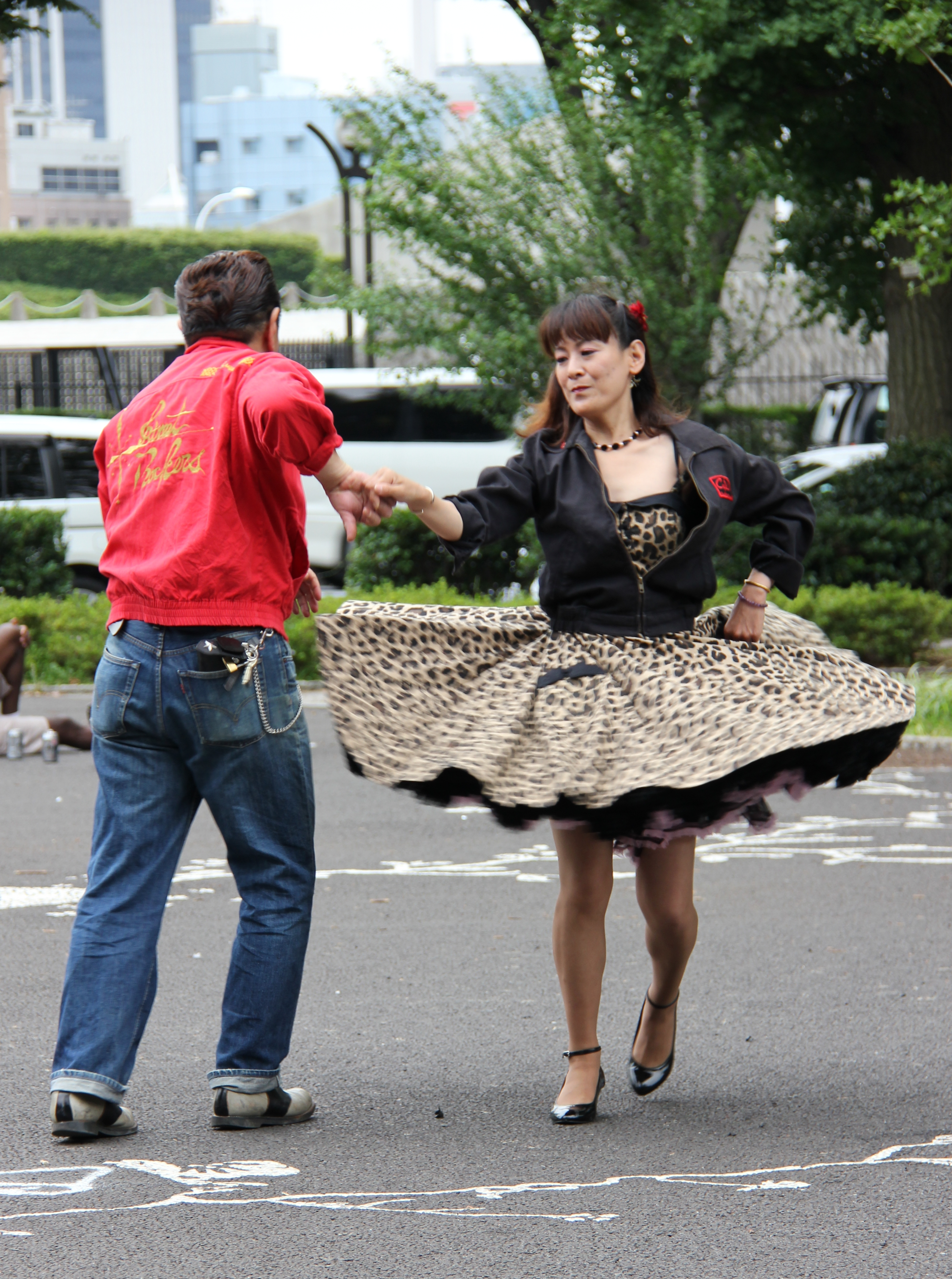 Yoyogi Rockers